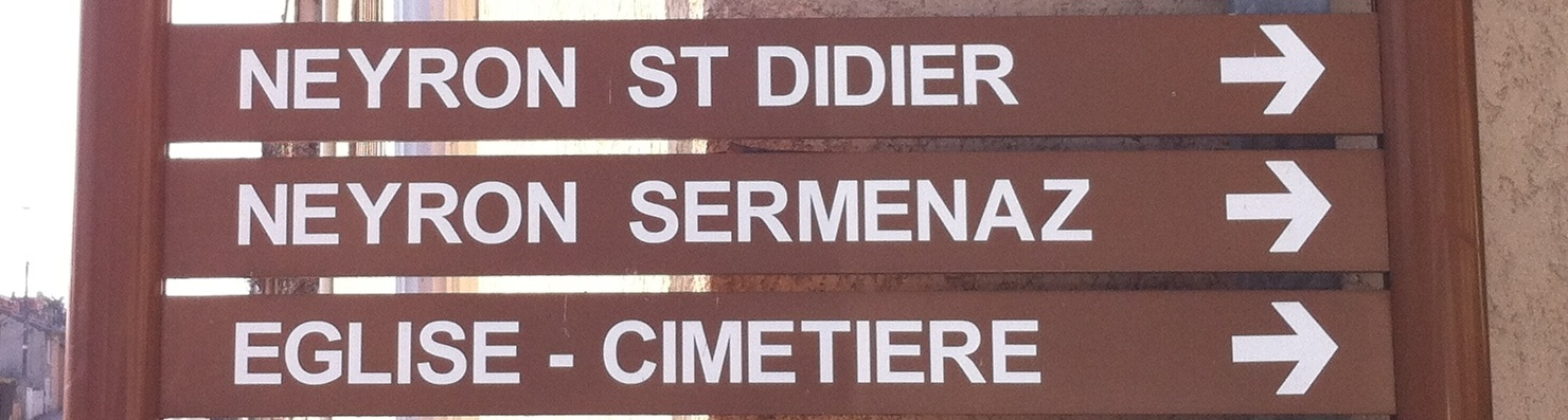 Panneaux situé à Neyron indiquant Neyron-Le-Haut (Saint Didier) et Sermenaz.